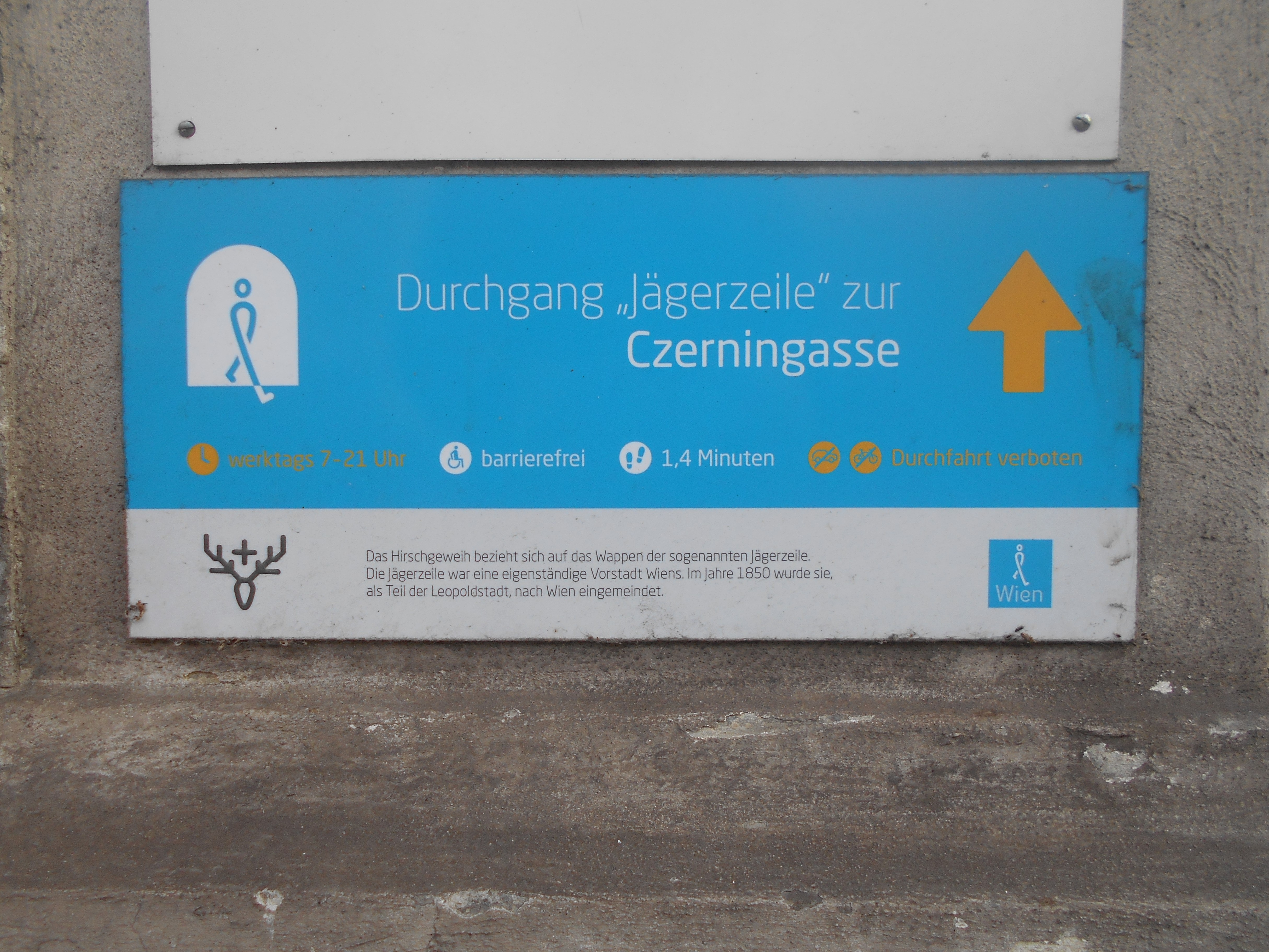 Ausschilderung der Passage Jägerzeile zwischen Praterstraße 42 und Czerningasse 7/7a